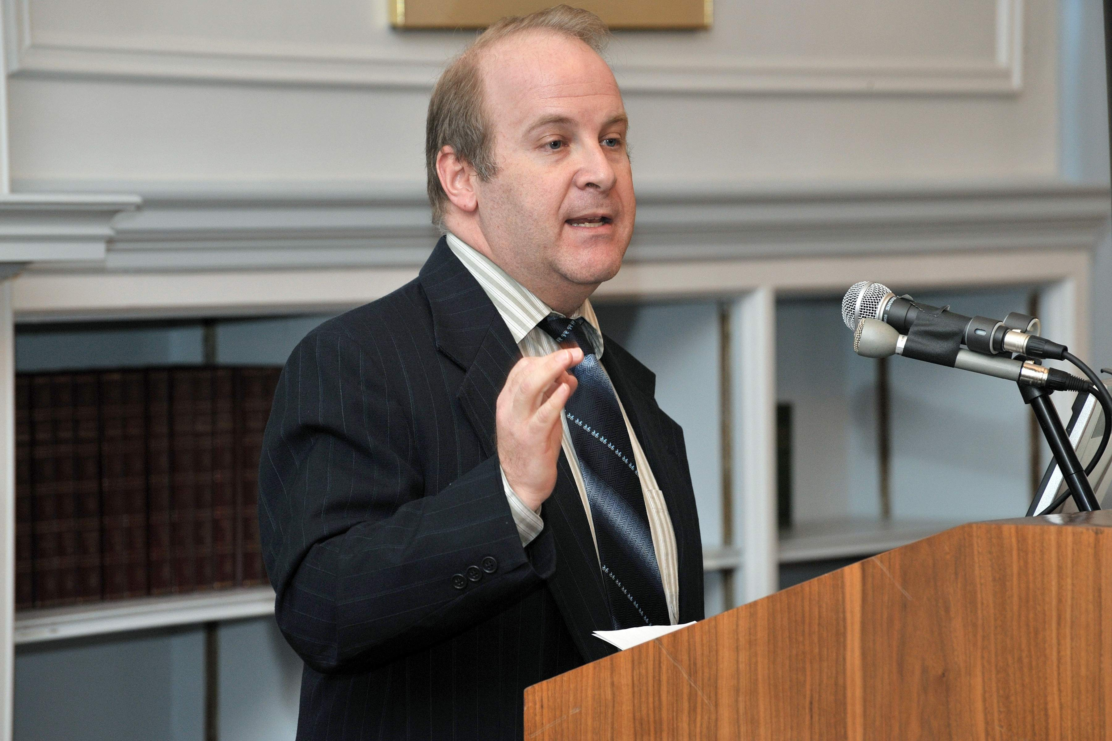 Moisés Salinas Fleitman